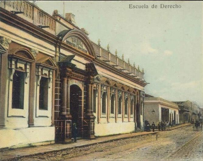 Edificio de la Escuela Facultativa de Derecho y Notariado, 1910.